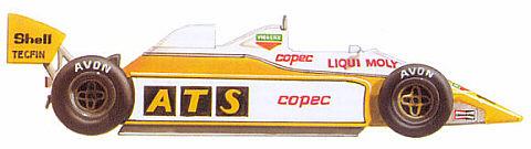 L'ATS D5 vettura di formula 1 del 1981